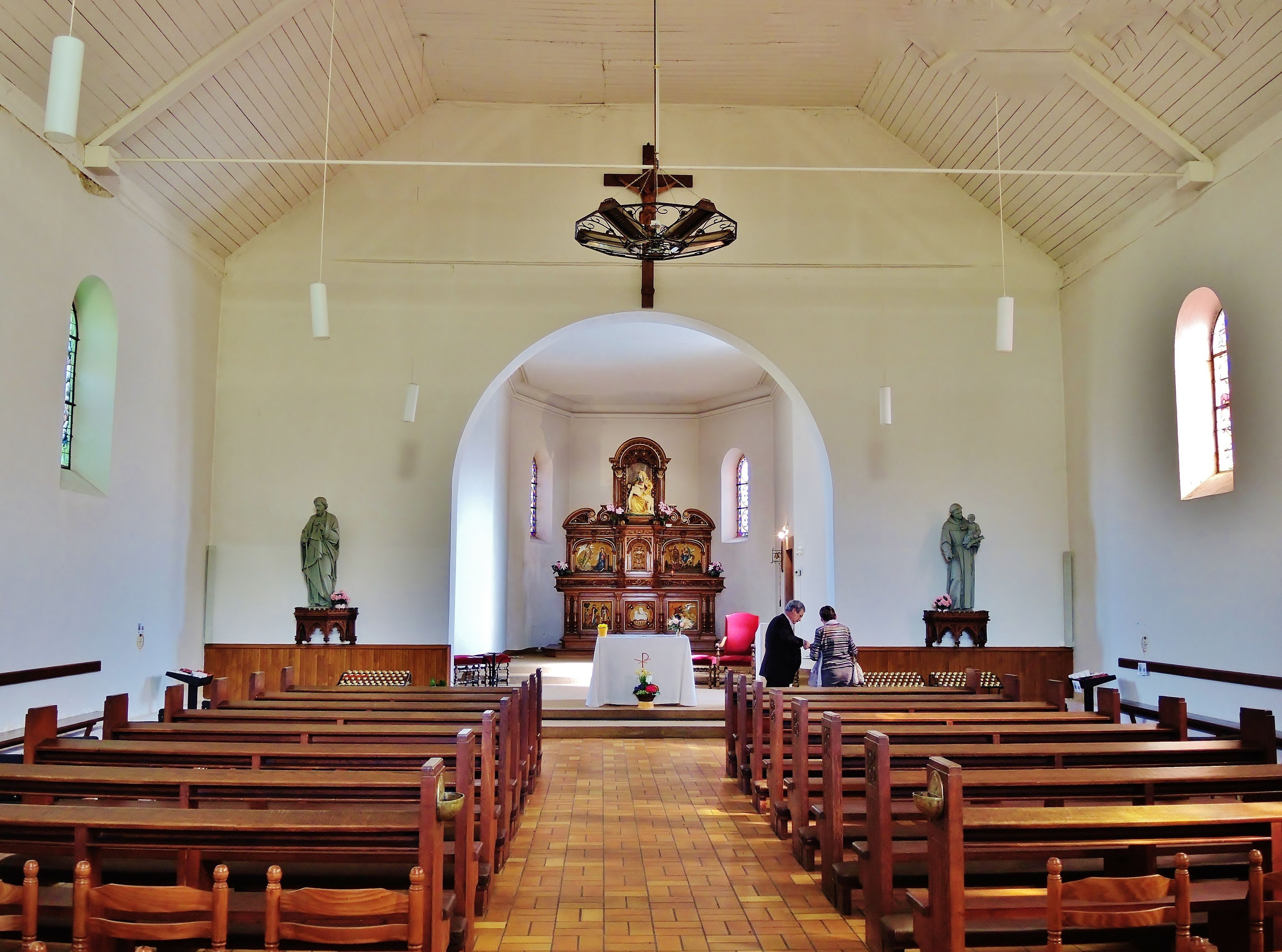 Intérieur de la chapelle Notre-Dame de Thierhurst. Heiteren. Haut-Rhin